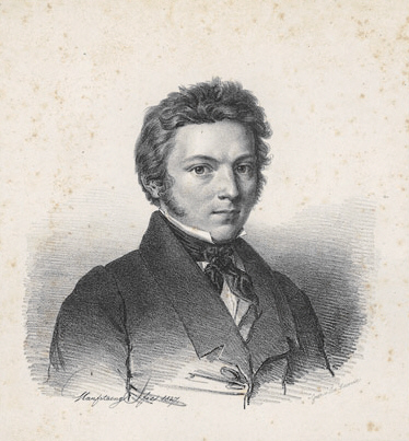 Porträt August Riedel